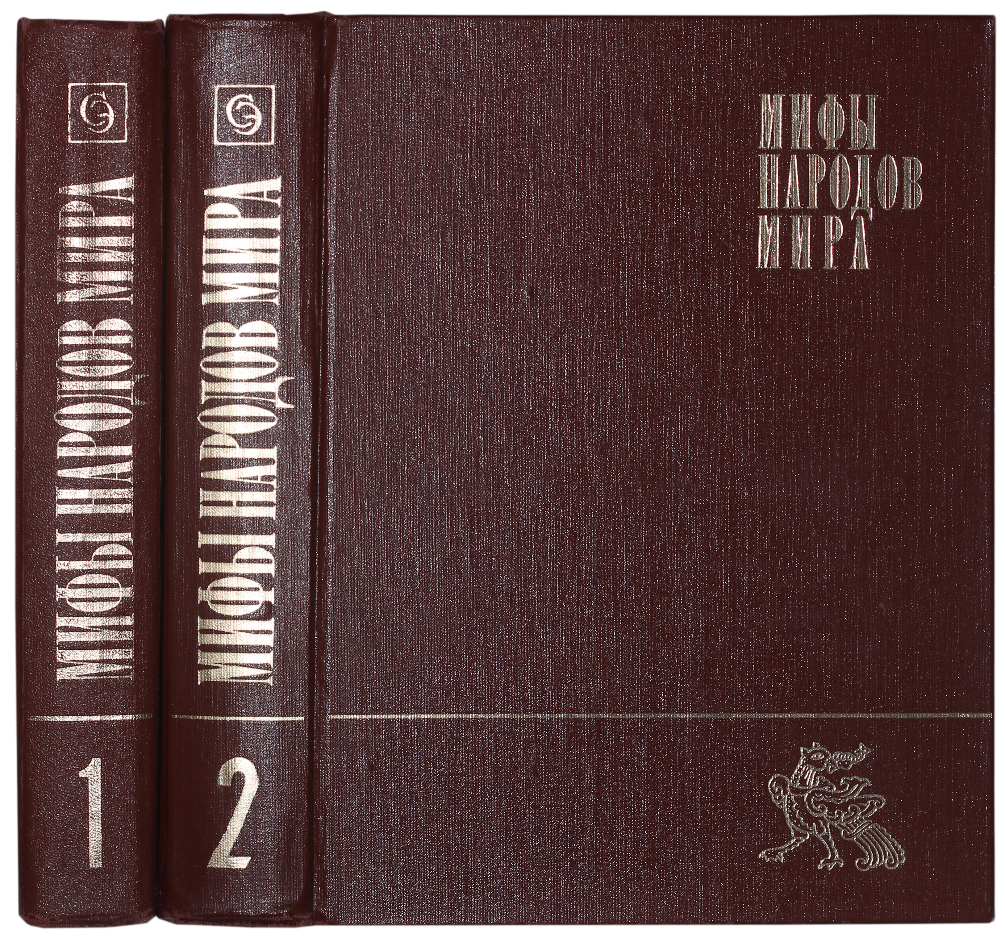 Мифы народов мира в двух томах